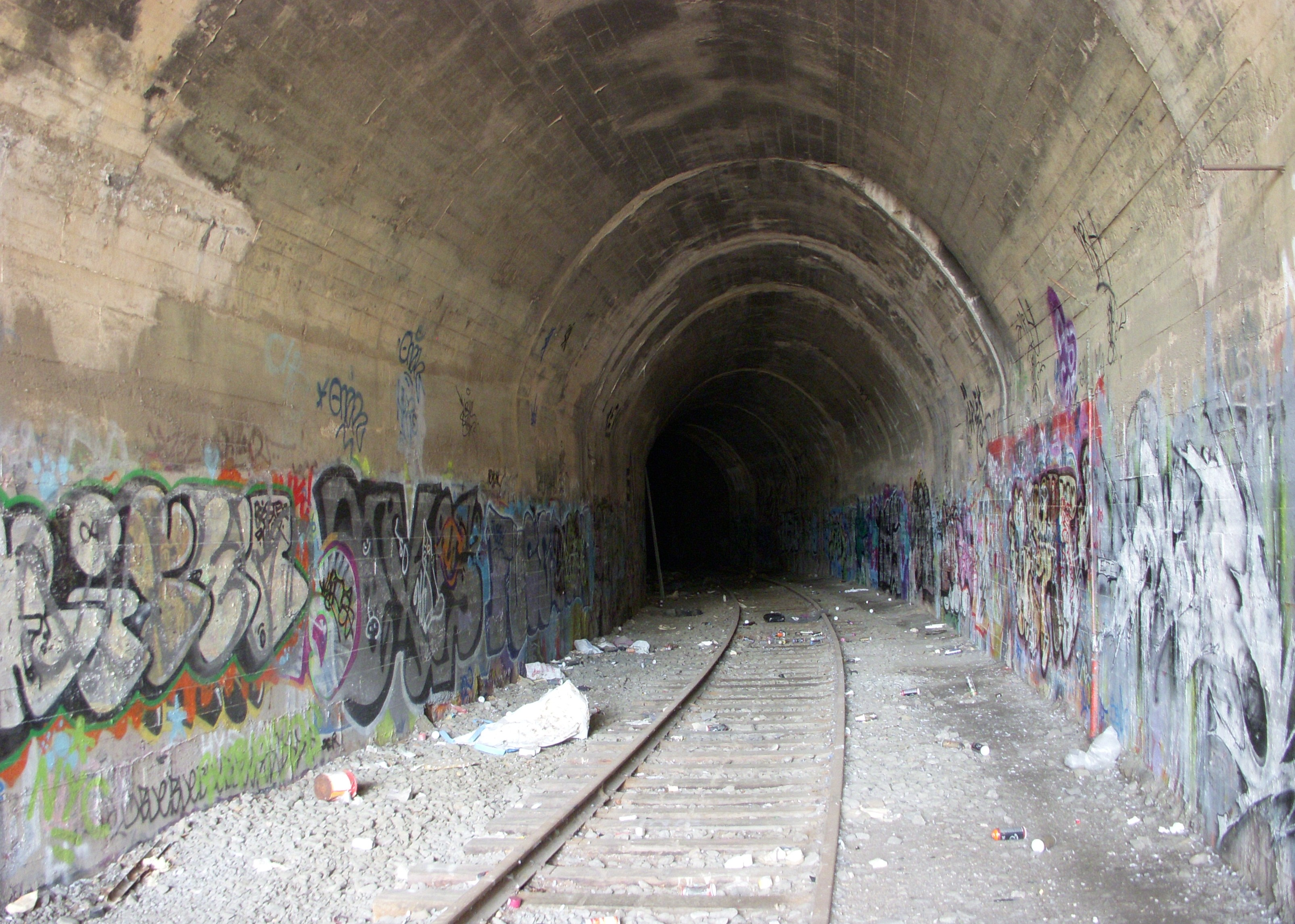 Industrispårets tunnel under Fåfängan, Södermalm, Stockholm